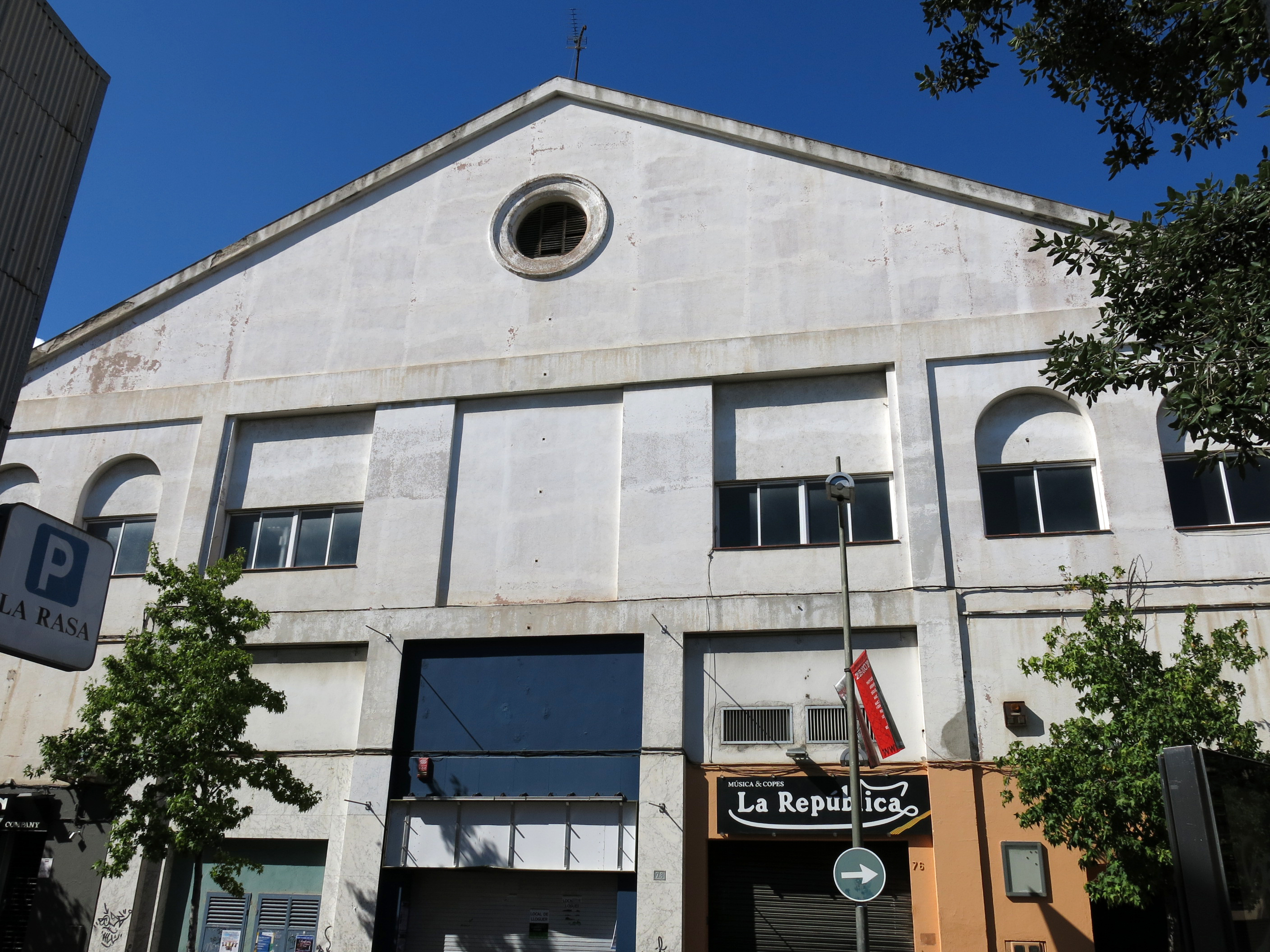 Antic cinema Alegria, c. de la Rasa 76-78 (Terrassa)